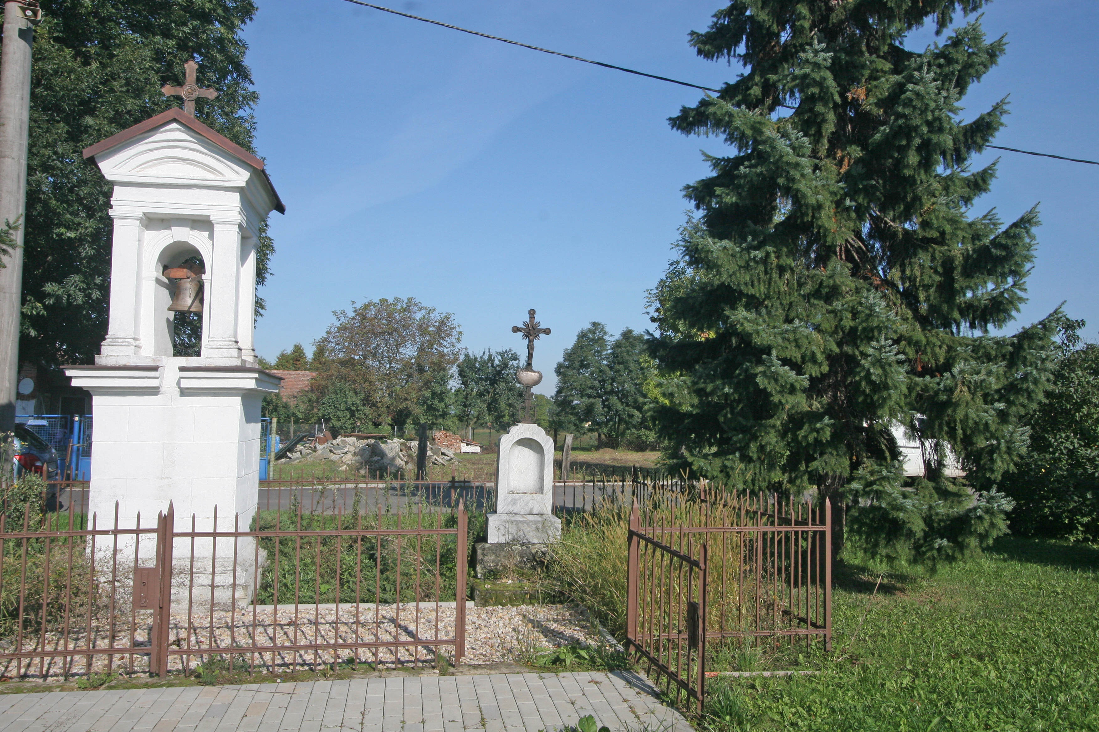 Nákle zvonička a křížek